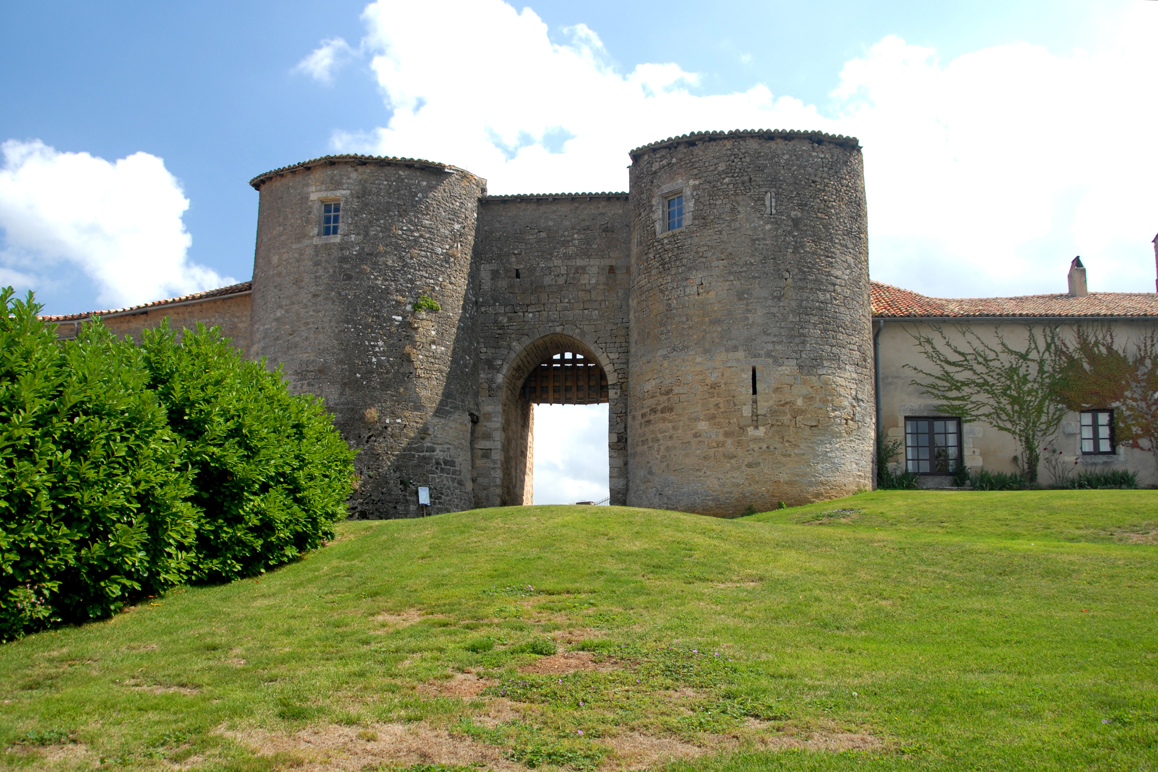 Château-Larcher, Hauptportal zum Castrum